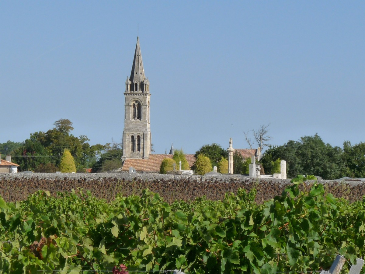 Civrac-en-Médoc, Gironde, France; vue générale depuis le sud